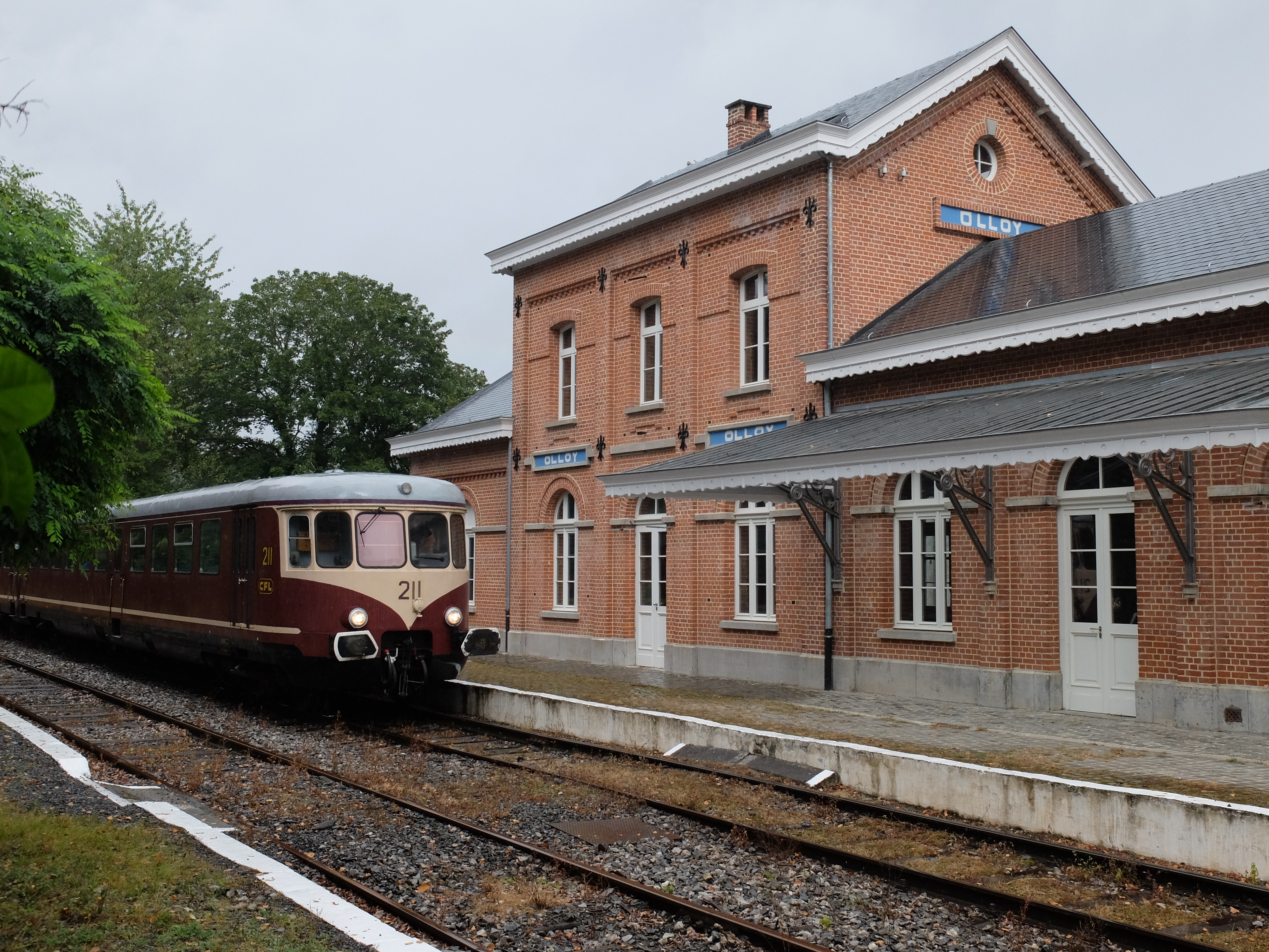 CFL 211 der C.F.V.3.V. im Bahnhof Olloy-sur-Viroin